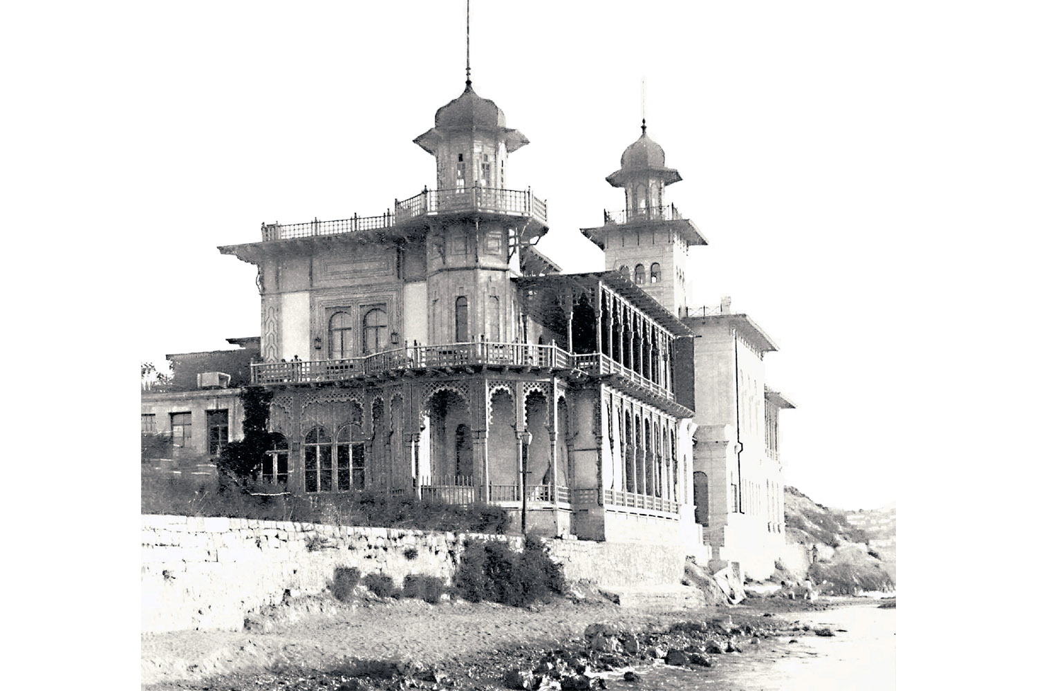 Севастопольский яхт-клуб (здание клуба построенное по проекту архитектора М. Ю. Арнольда)